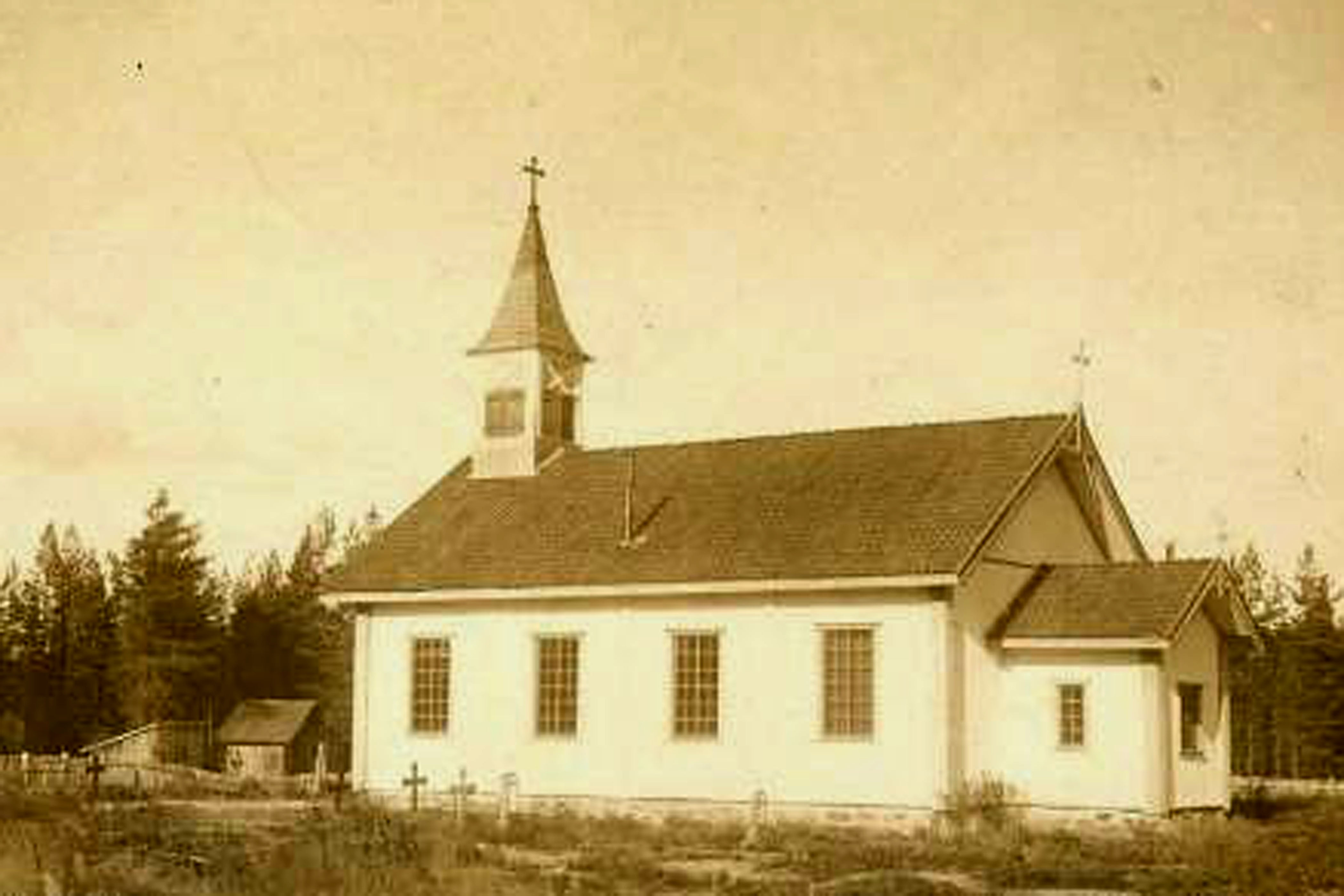 Gamle Lundersæter kirke, Norway